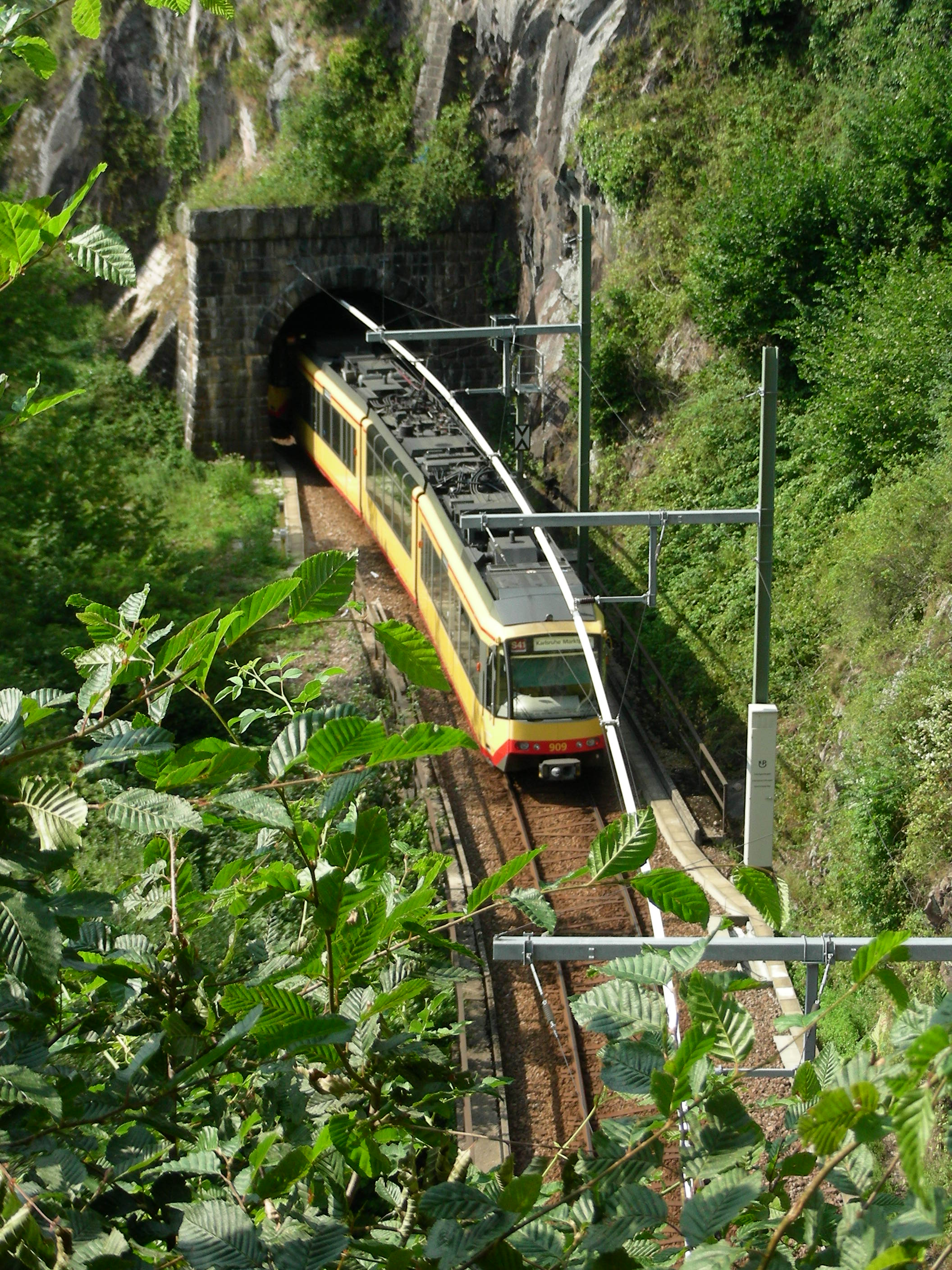 Stadtbahn auf der Murgtalbahn zwischen Stiehltunnel (sichtbarer Tunnelmund) und Rappentunnel